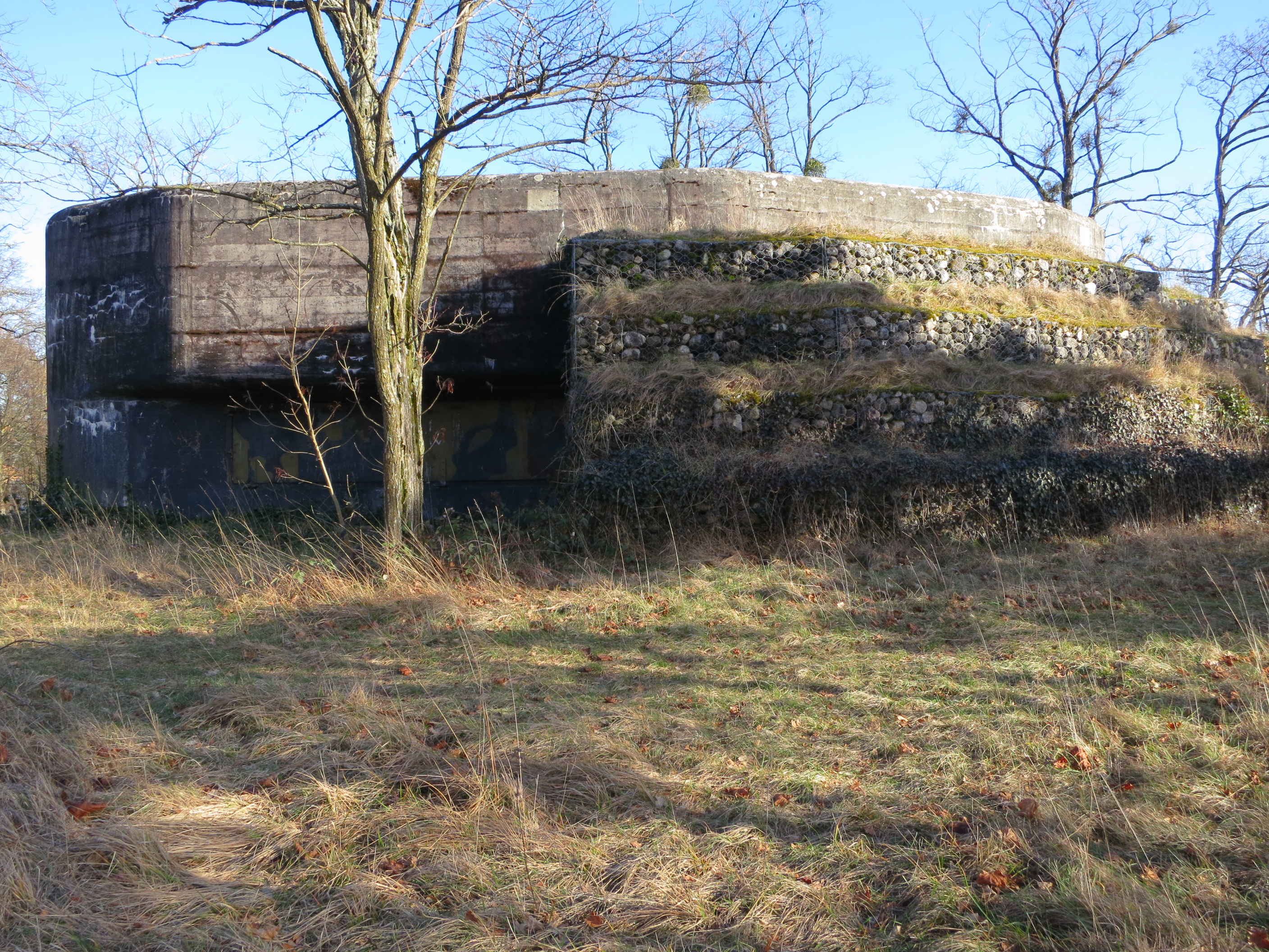 A730 Bunker, Gland VD, Schweiz